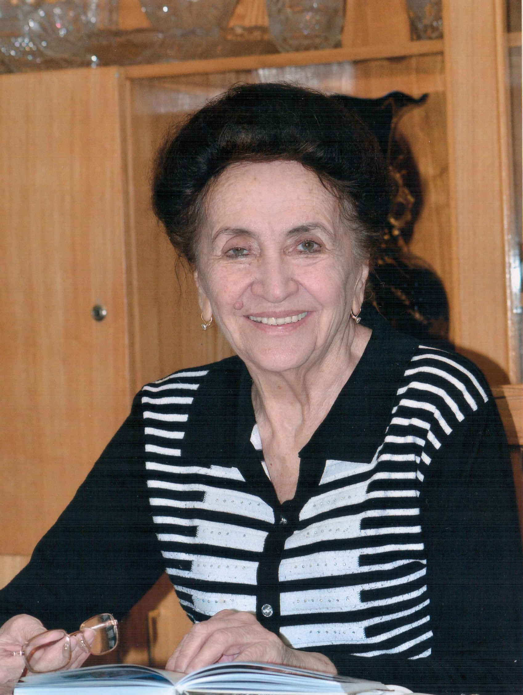 Наима Махмудовна Махмудова, Выдающийся общественный деятель Узбекистана, Депутат Совета Национальностей Верховного Совета СССР 10 и 11 созывов